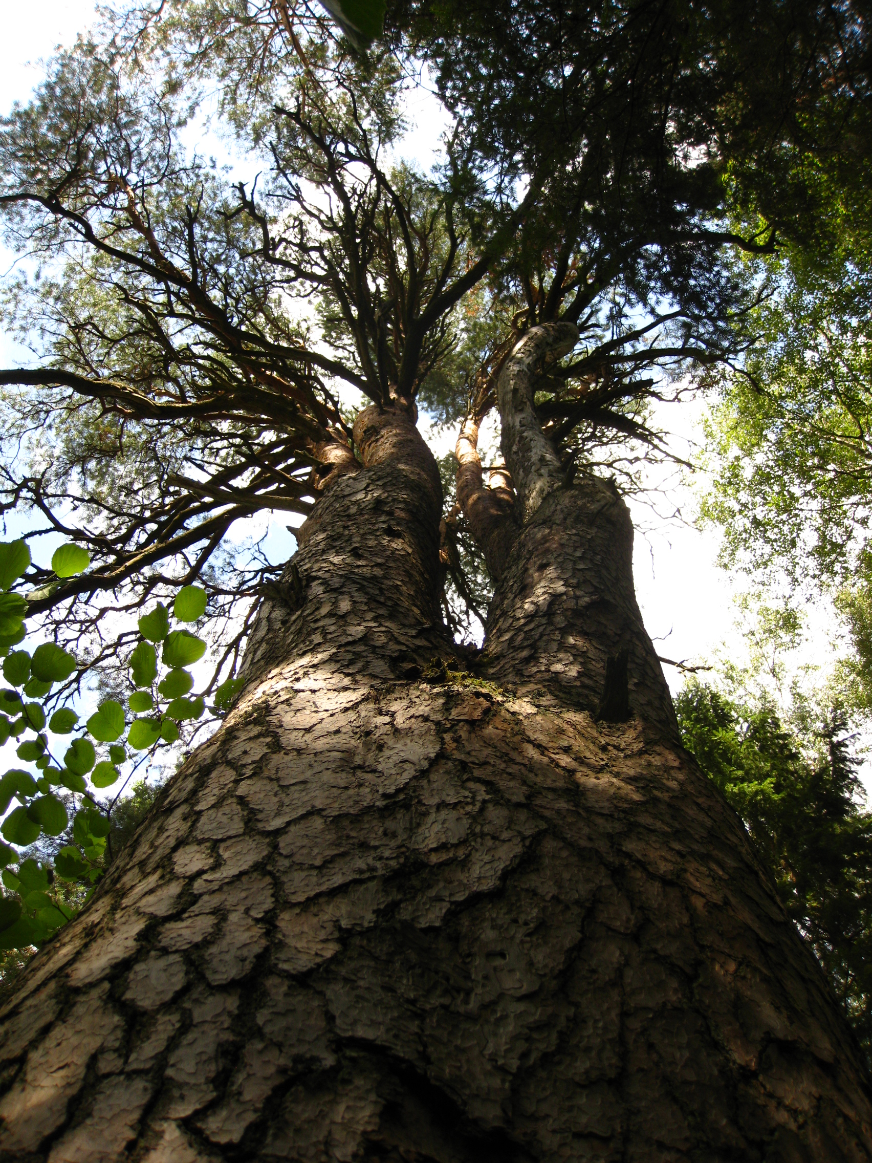 Ramsi Metsaema mänd Pärsti vallas